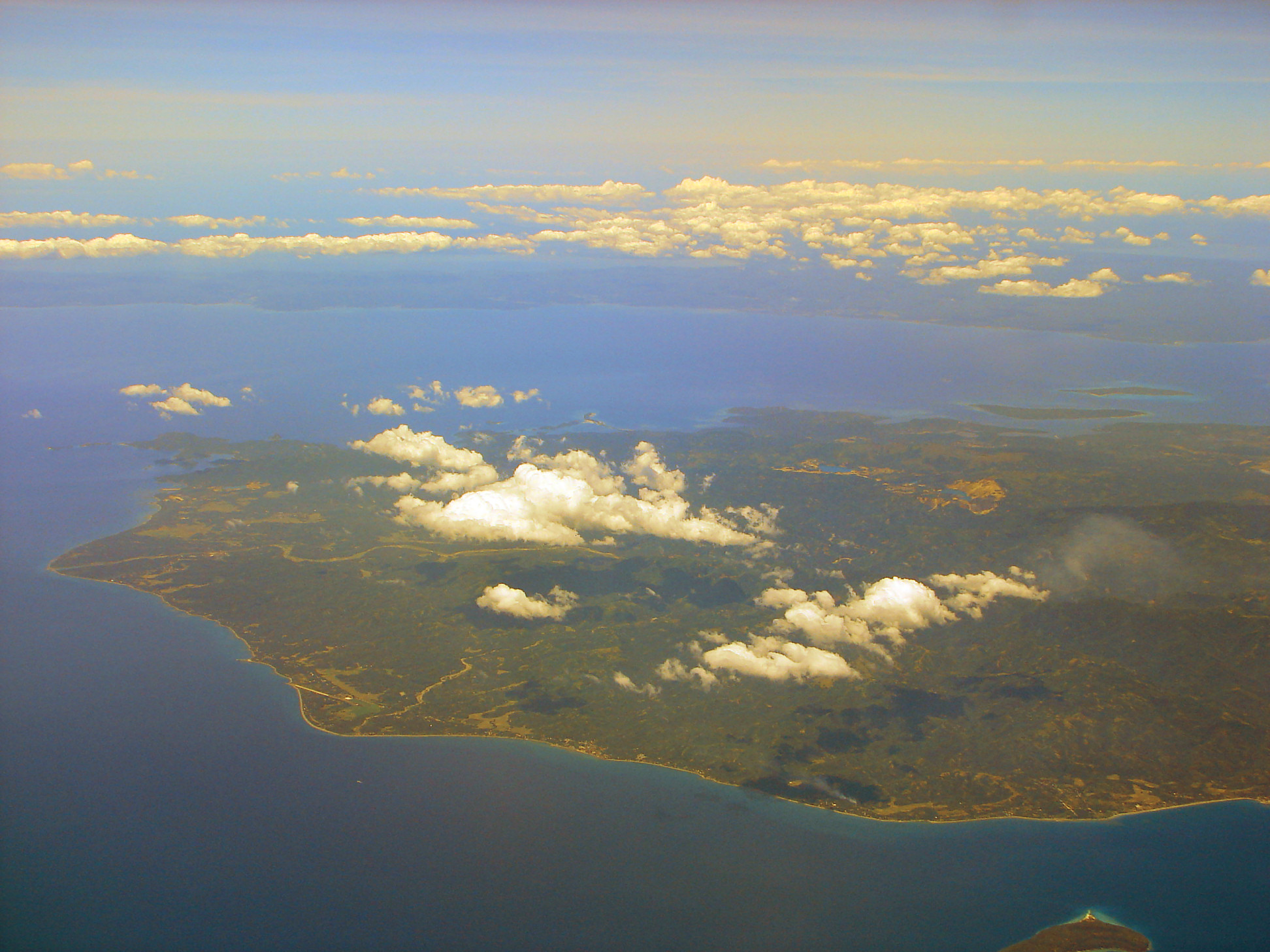 Marinduque, Philippines